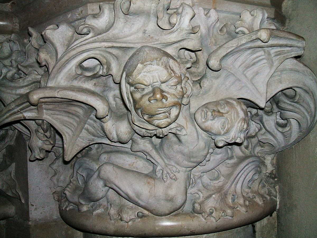 Capitel, cripta de la Catedral Nueva de Vitoria-Gasteiz, España/Spain